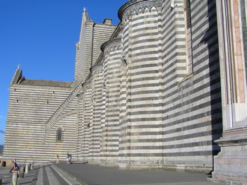 Dom von Orvieto. Die charakteristische Marmorfassade erinnert an den Dom von Siena.